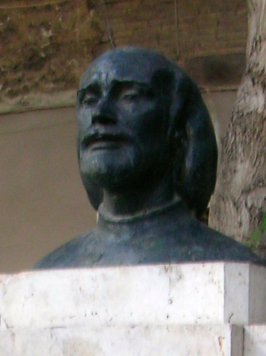 Bust en bronze de Marçal de Sax, obra de Rafael Pérez Contel, en el jardinet contigu a l'església de Sant Agustí de València